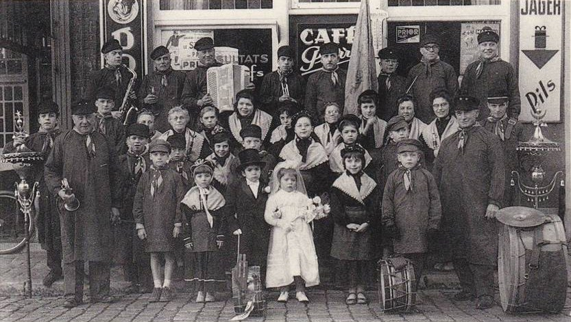 Les Joyeux Bigophones du Tuquet à Mouscron (Belgique).